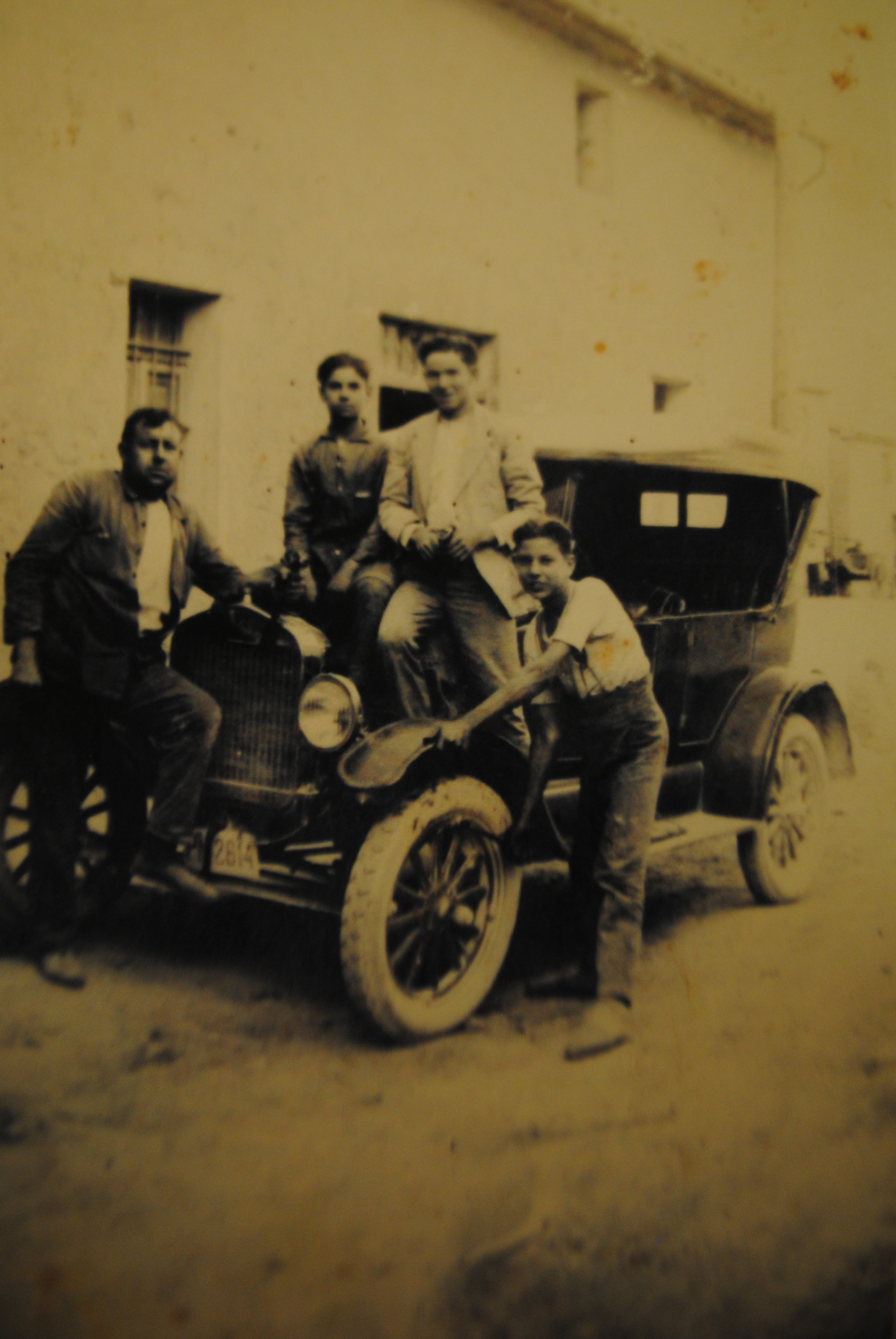 El cotxe, devers el 1920, encara era una novetat a Mallorca.